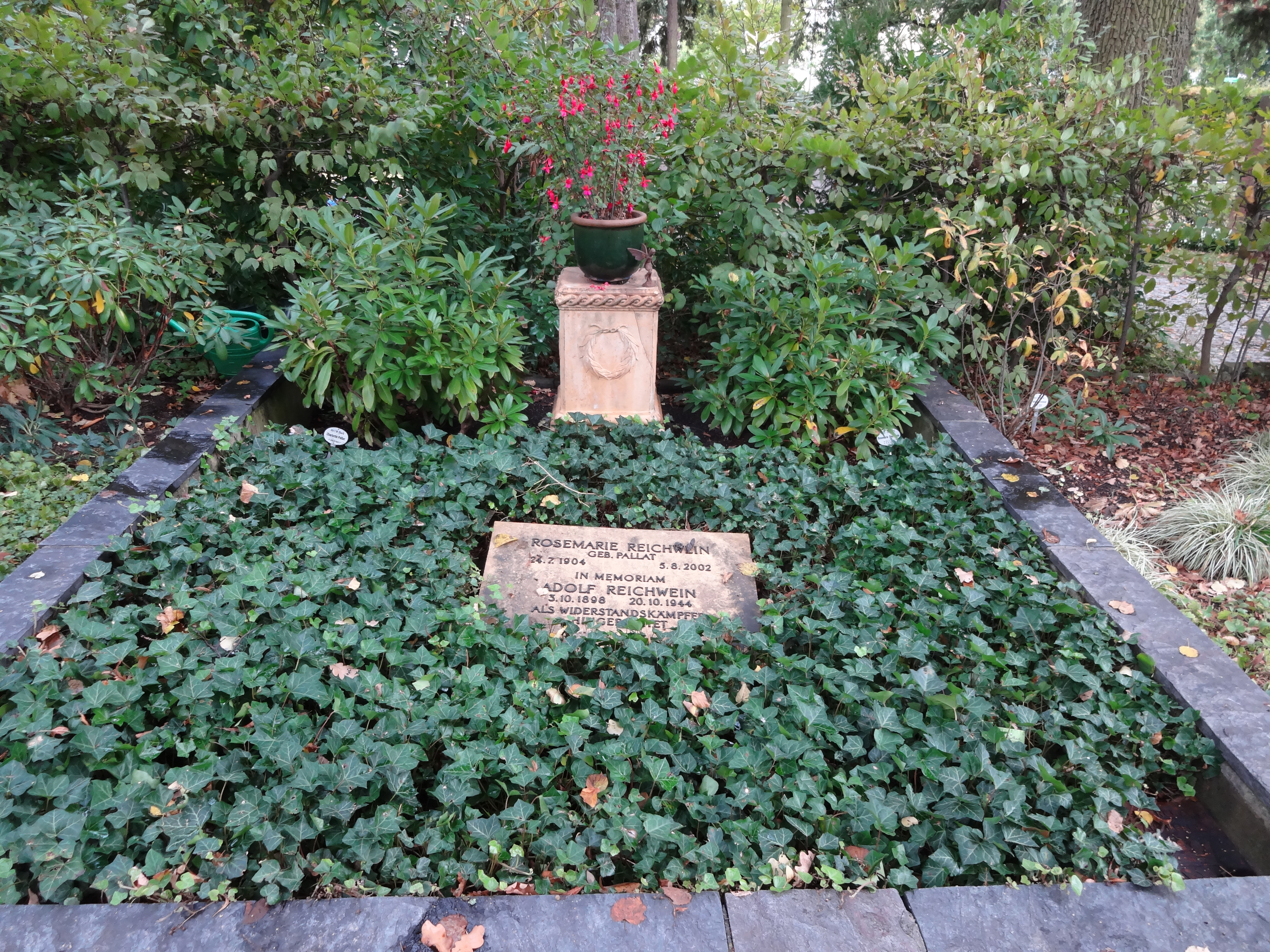 Grab von Rosemarie Reichweinauf dem Alten Friedhof Wannsee und Gedenktafel für ihren Mann Adolf Reichwein